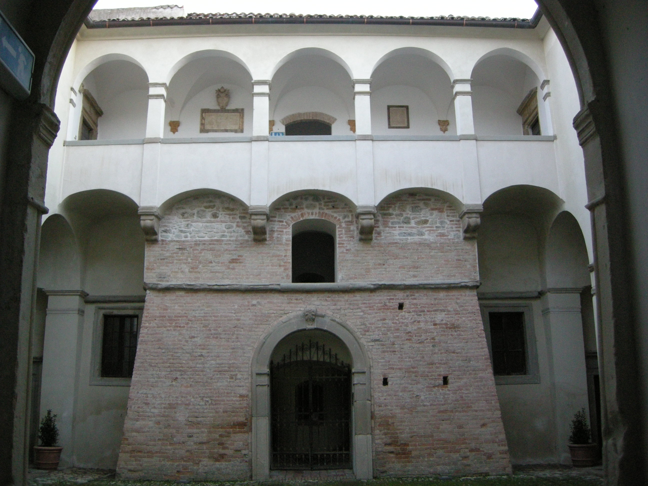 Sassocorvaro, rocca, cortile